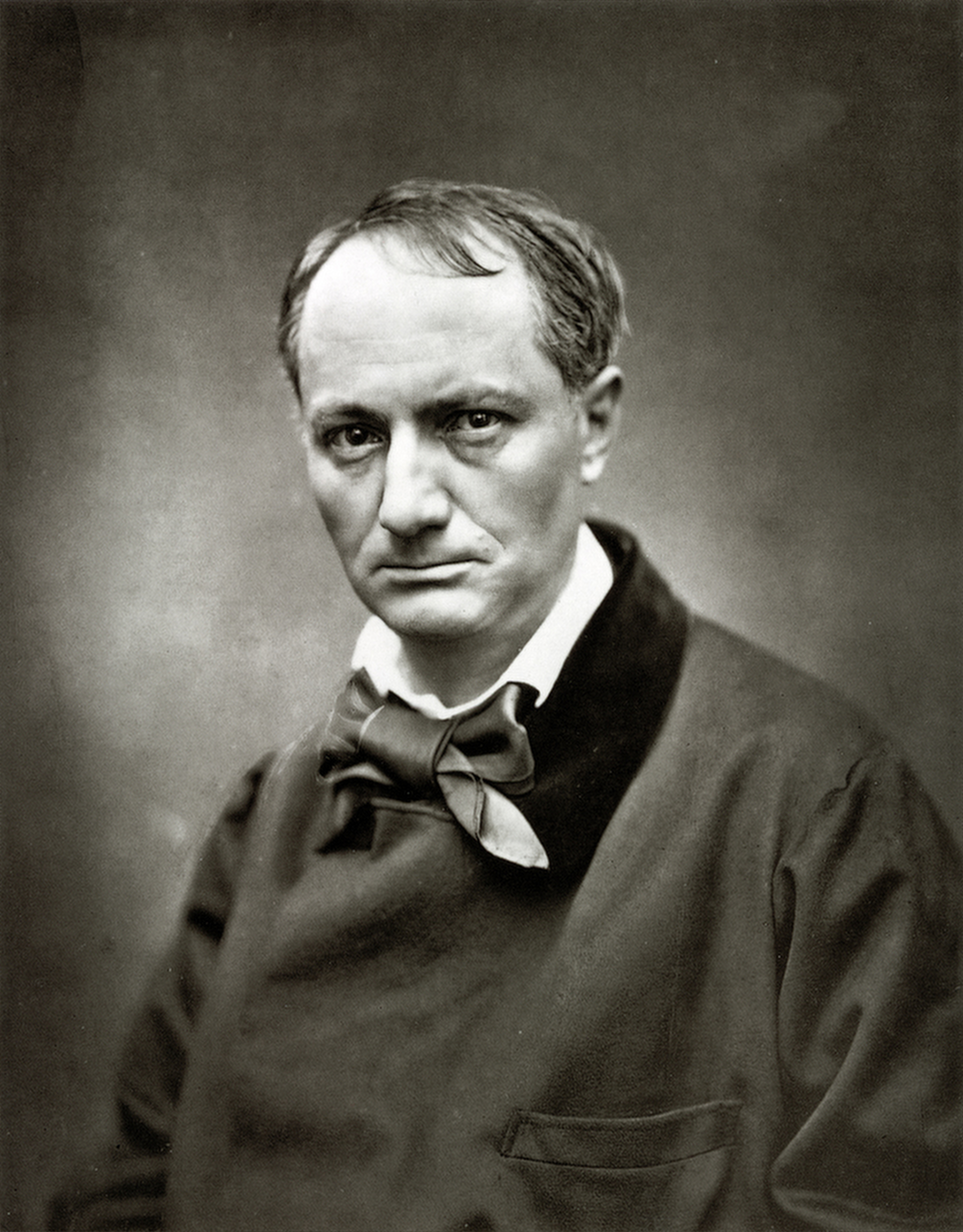 Charles Baudelaire (1821-1867)